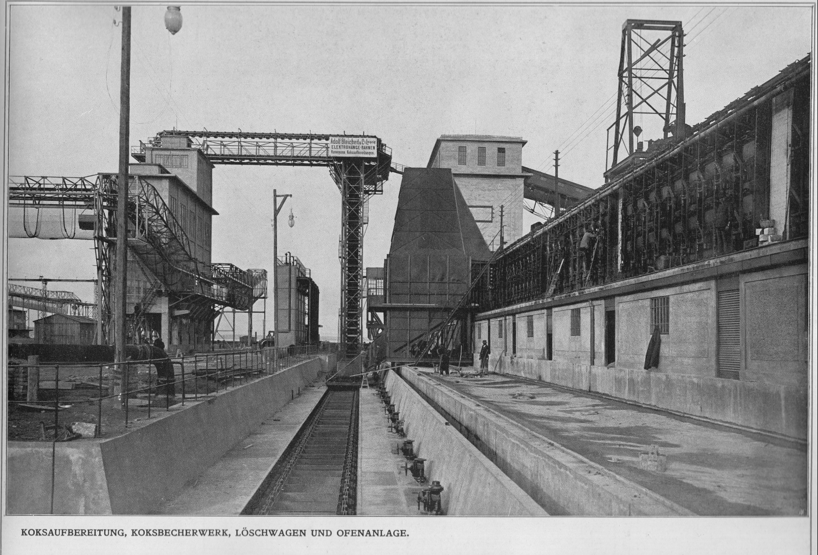 Städtische Gaswerk Leopoldau: Koksaufbereitung, Koksbecherwerk, Löschwagen und Ofenanlage